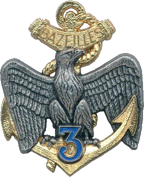 Insigne du 3eme RIMa sous fond transparent